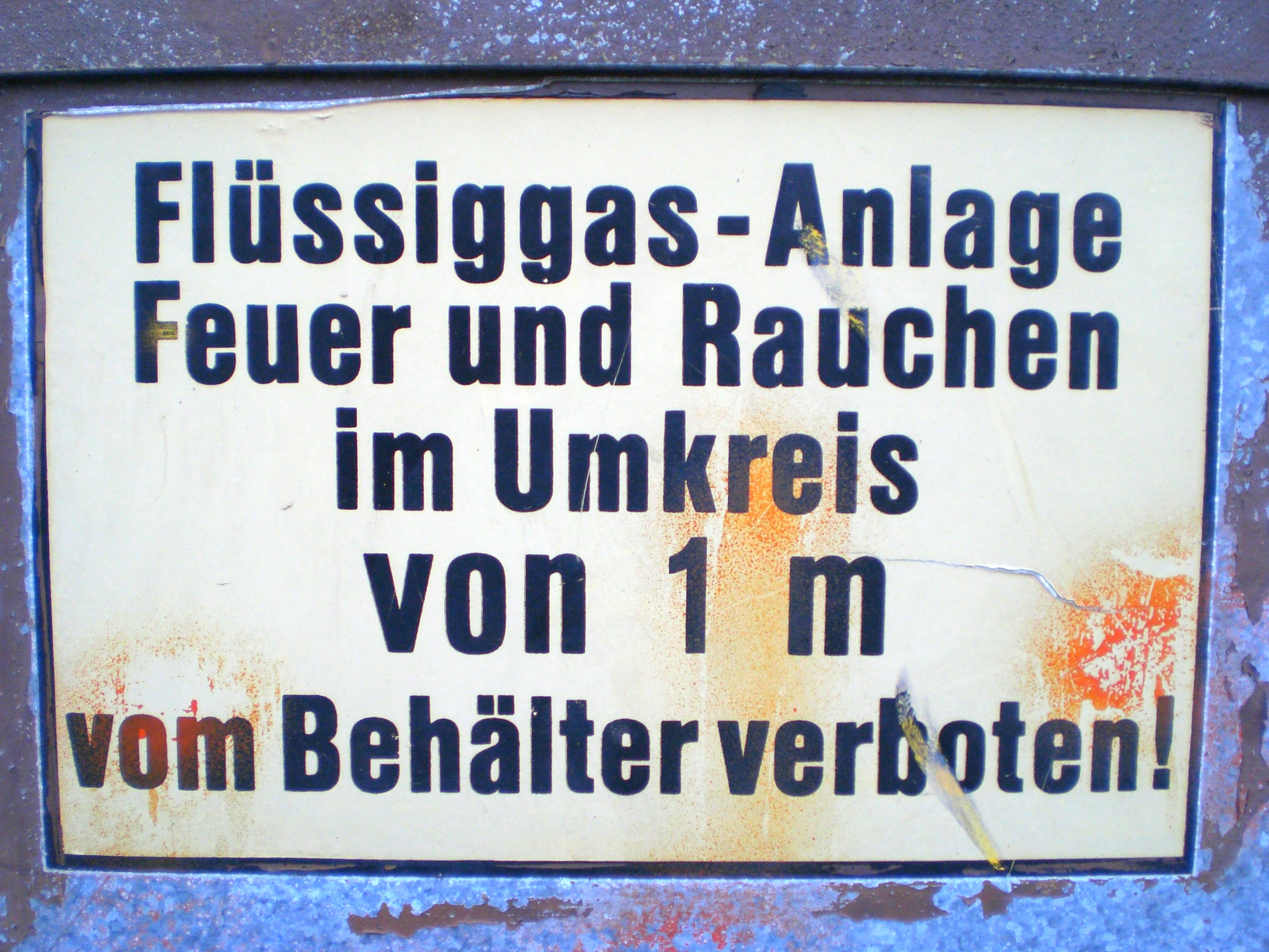 Warnschild an einem Flüssiggasbehälter. Goethe-Schule Flensburg